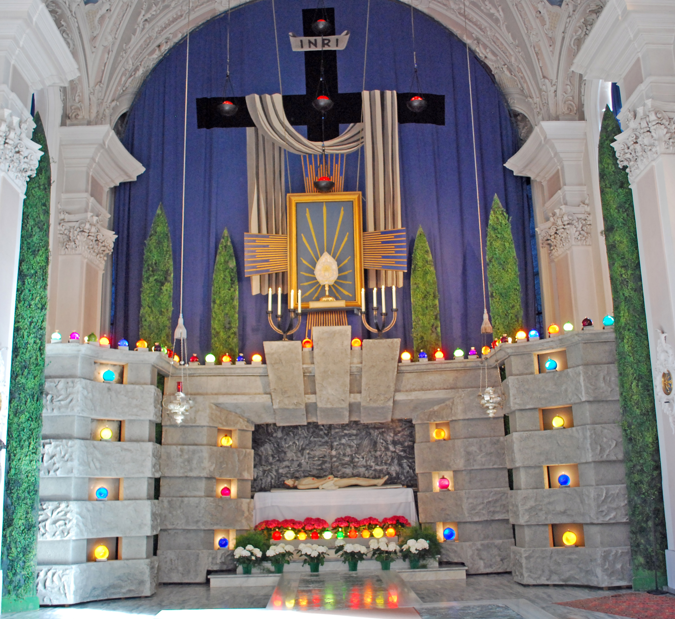 Heiliges Grab Fulpmes